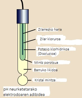 Elektrodoa